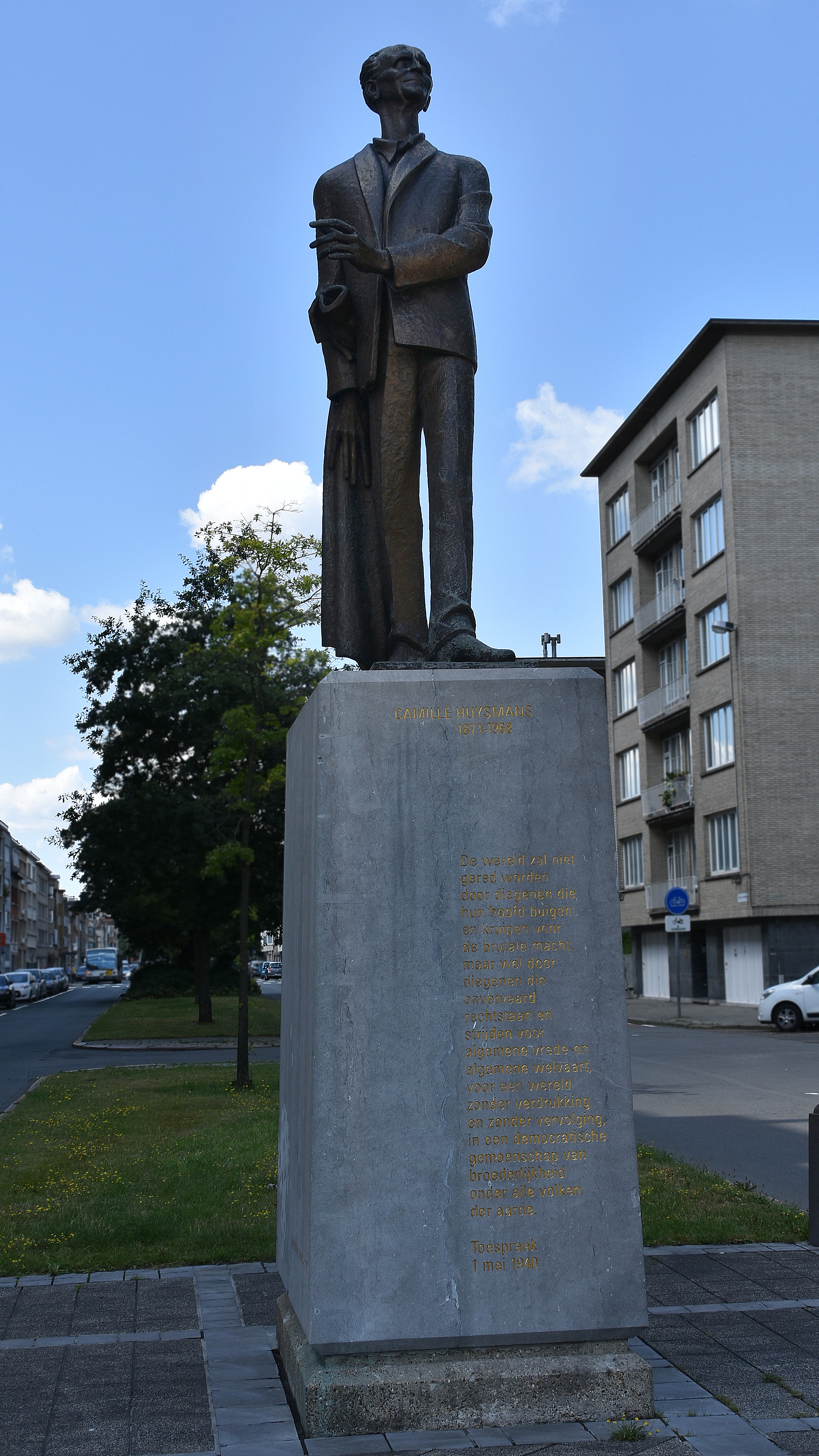 Standbeeld Camille Huysmans Antwerpen (302639) 29-07-2019 This photo of immovable heritage has been taken in the Flemish Region